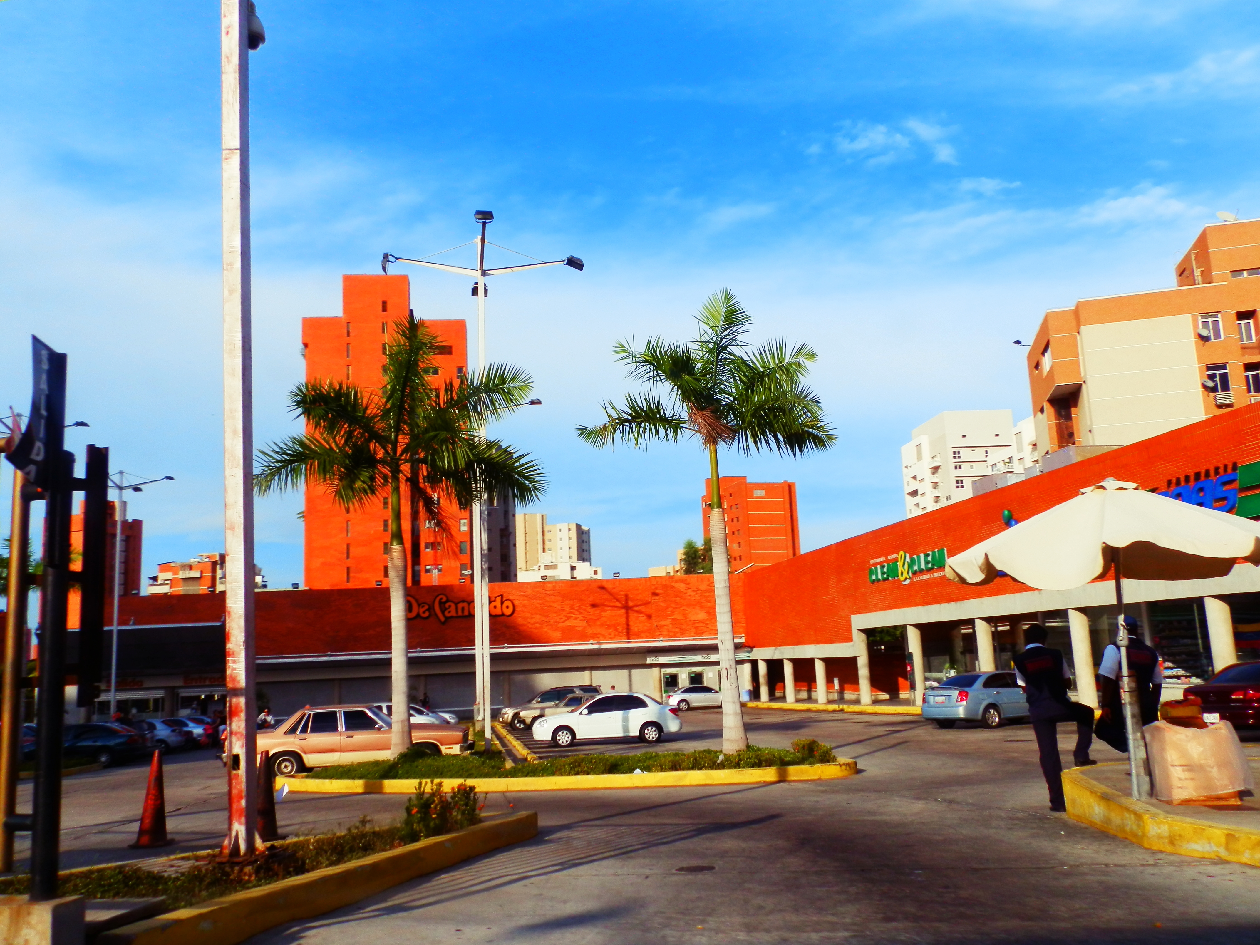 Tienda De candido y Edificios en Maracaibo, Venezuela